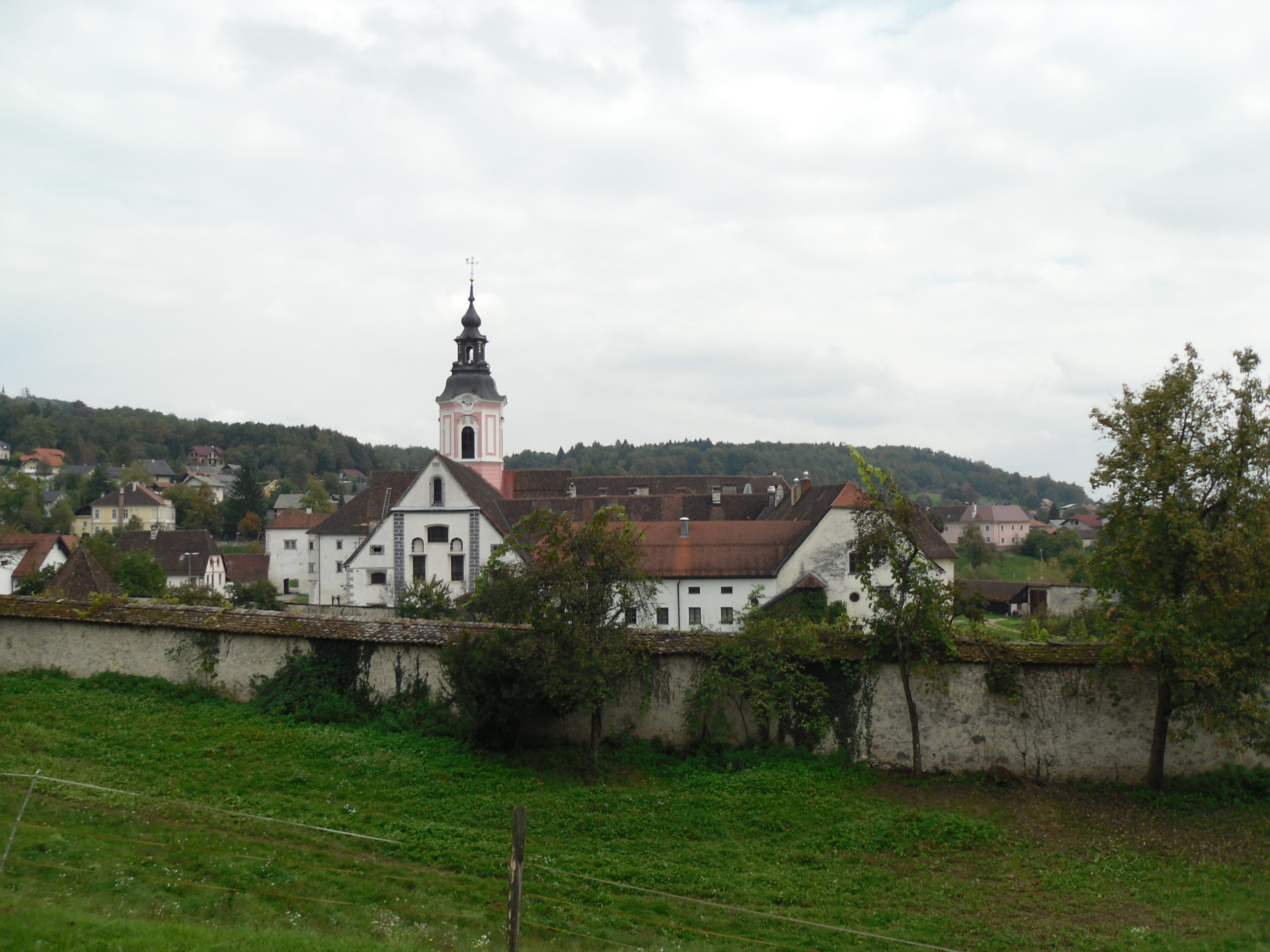 Stična